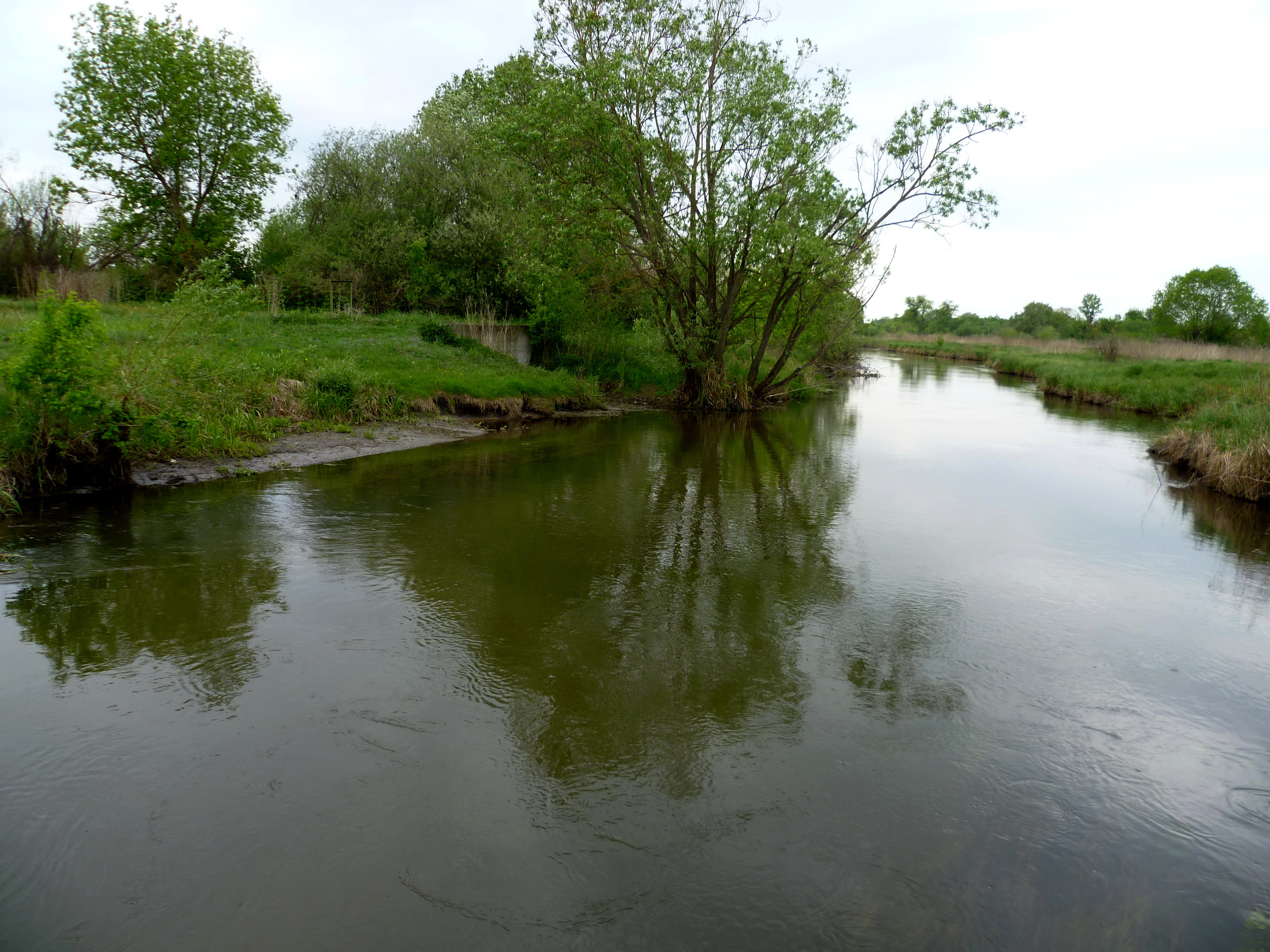 "Козацькі могили" - урочище заповідне болотне (Рівненська область, Радивилівський район, с. Пляшева. Пляшевська сільська рада. Площа 3,5 га) - з містка до села Пляшева